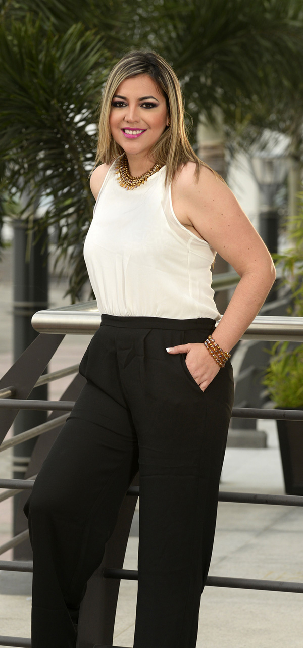 Wendy Vera, jueza de Ecuador tiene talento